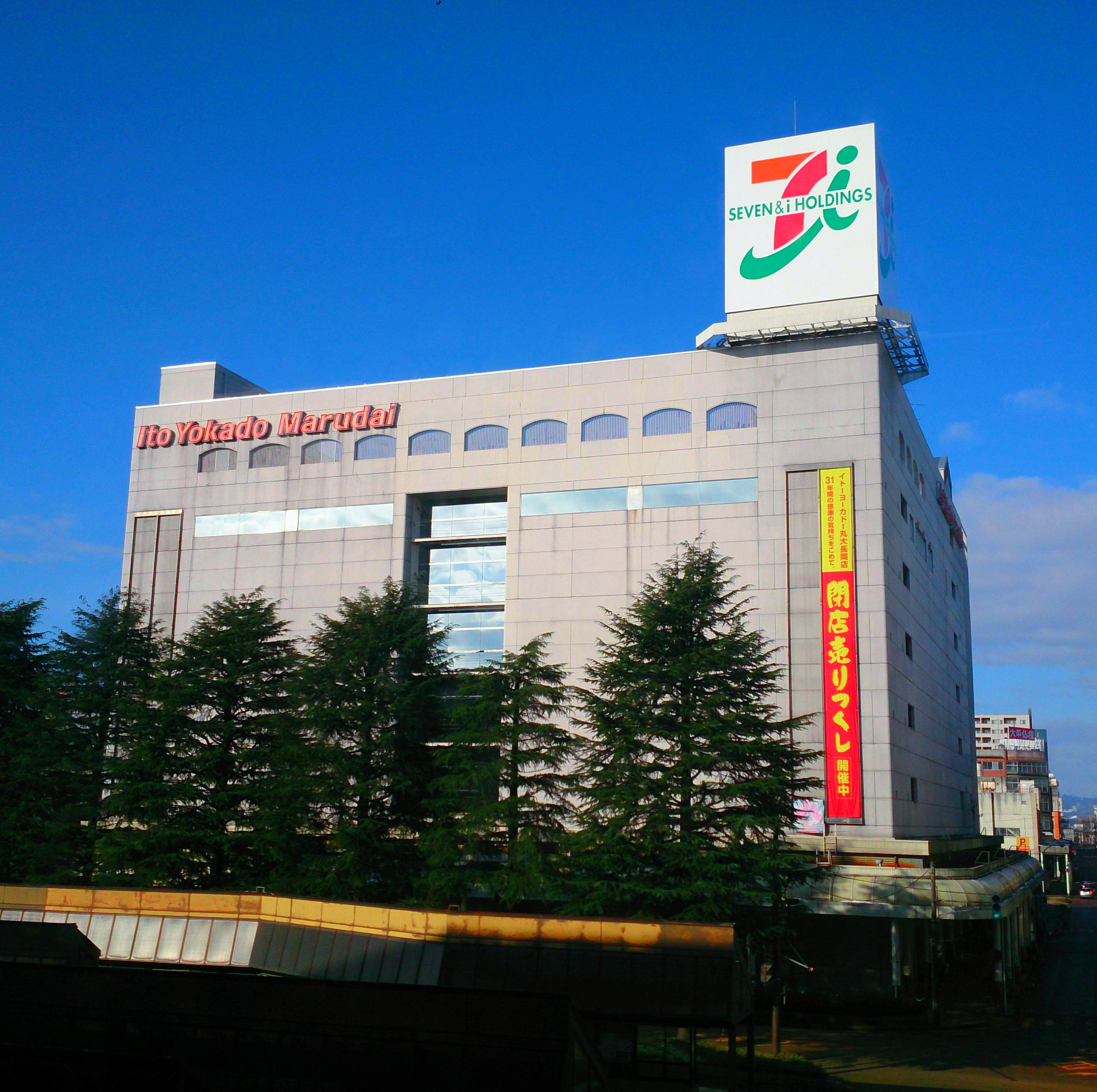 イトーヨーカドー丸大長岡店の建物外観（閉店売りつくし開始後）